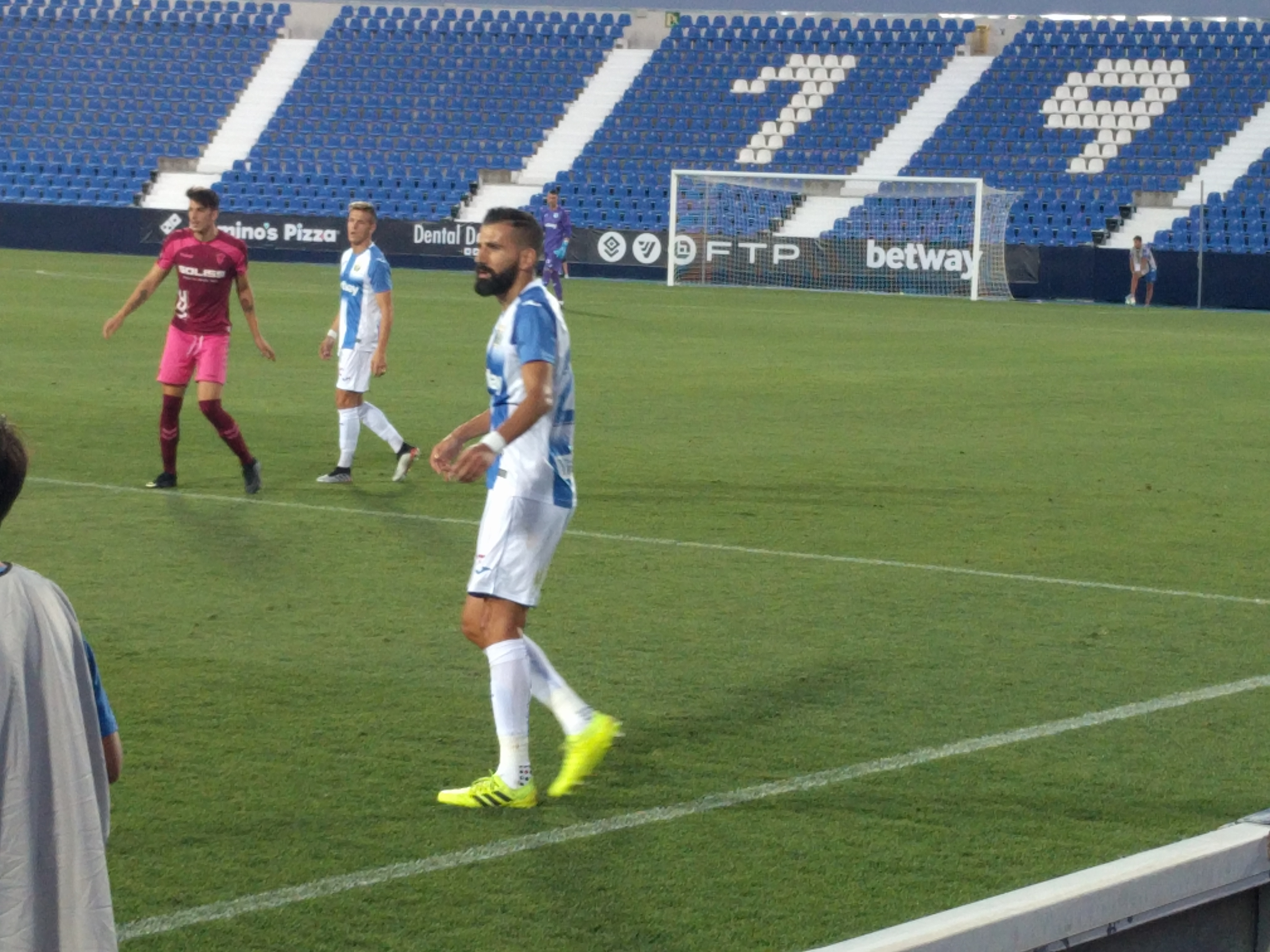 Dimitrios Siovas en el XL Trofeo Villa de Leganés, con la camiseta del Leganés